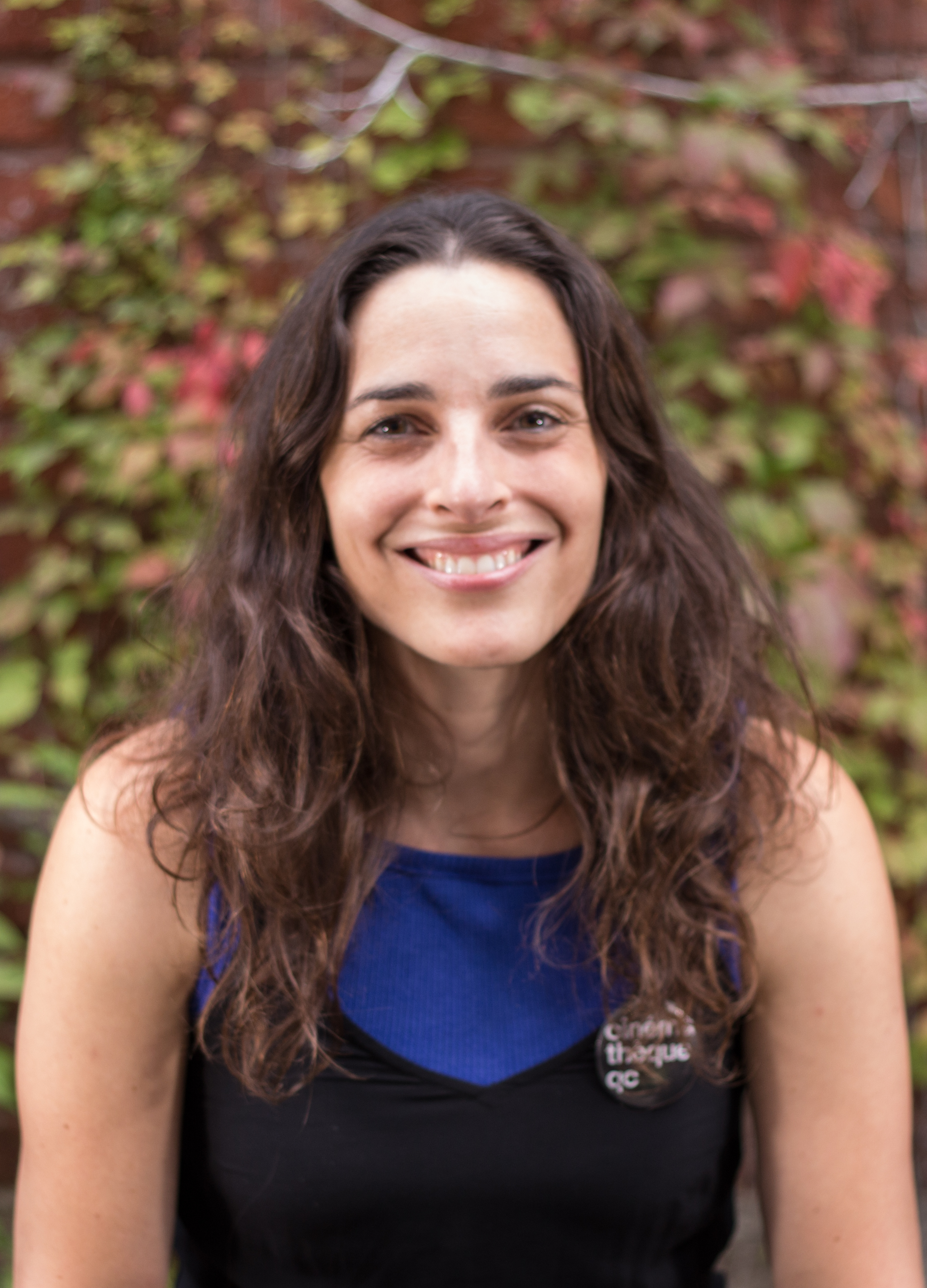 Portrait réalisé dans le cadre du 5 à 7 des Sommets du cinéma d’animation.